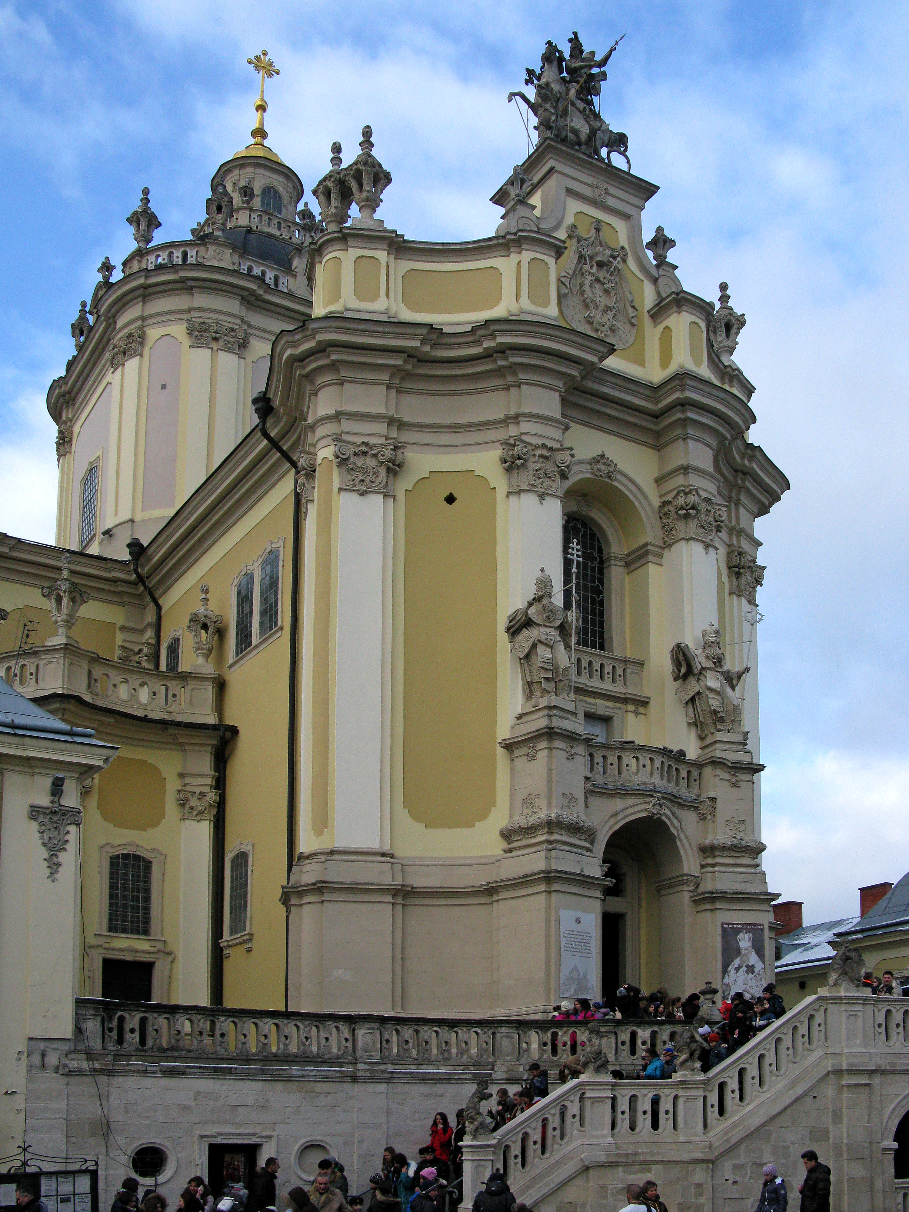 Собор святого Юра, Львів, Святого Юра пл., 5